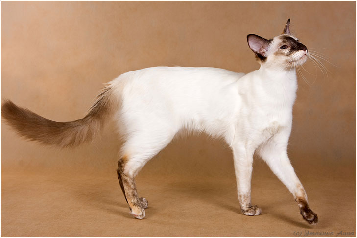 Ghislaine of Chrysanthe, balinese cat, female, chocolate tortie point, балийская кошка, окрас шоколадный черепаховый, собственность питомника Dizigner